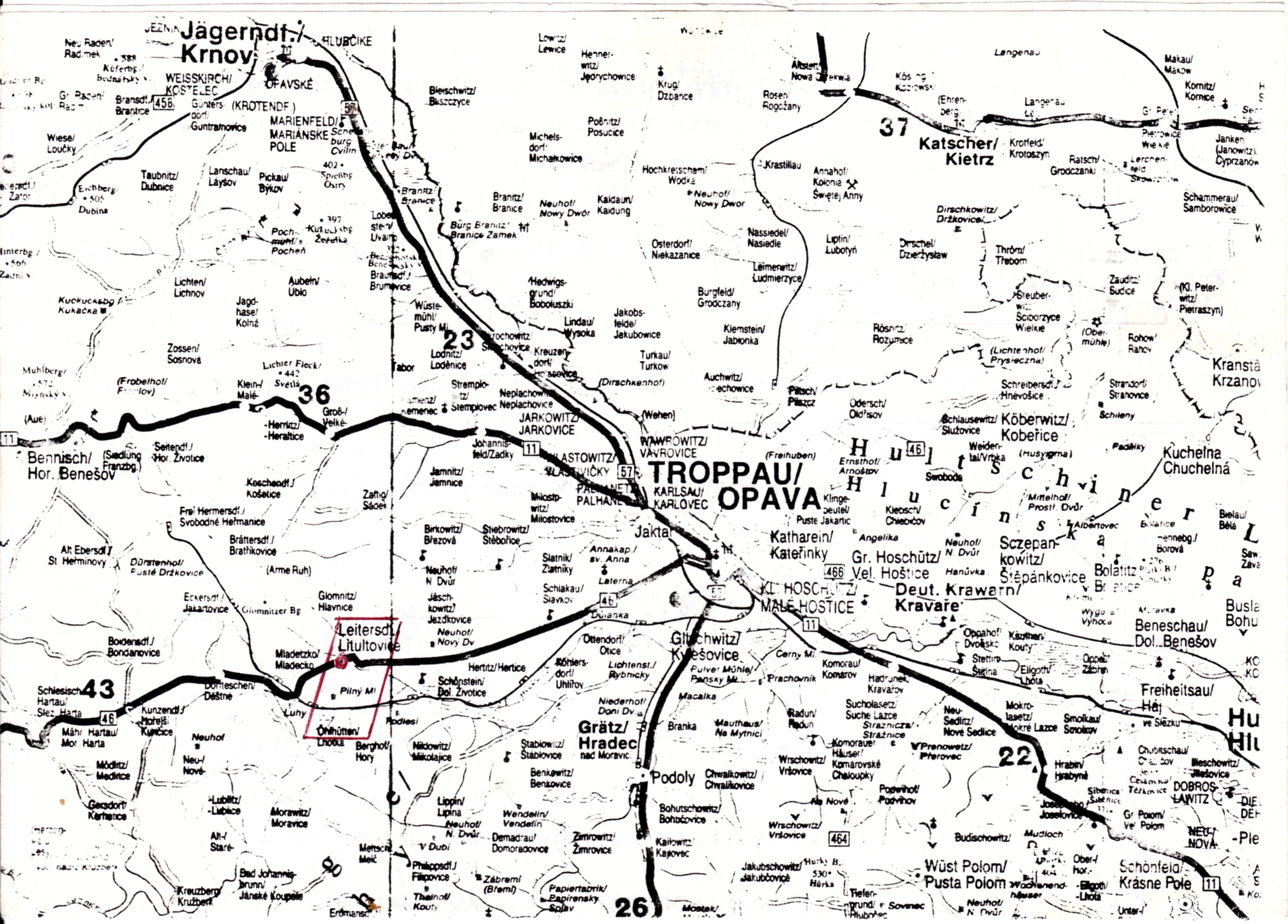 Kopie einer alten Karte des Troppauer Landes (Ausschnitt)